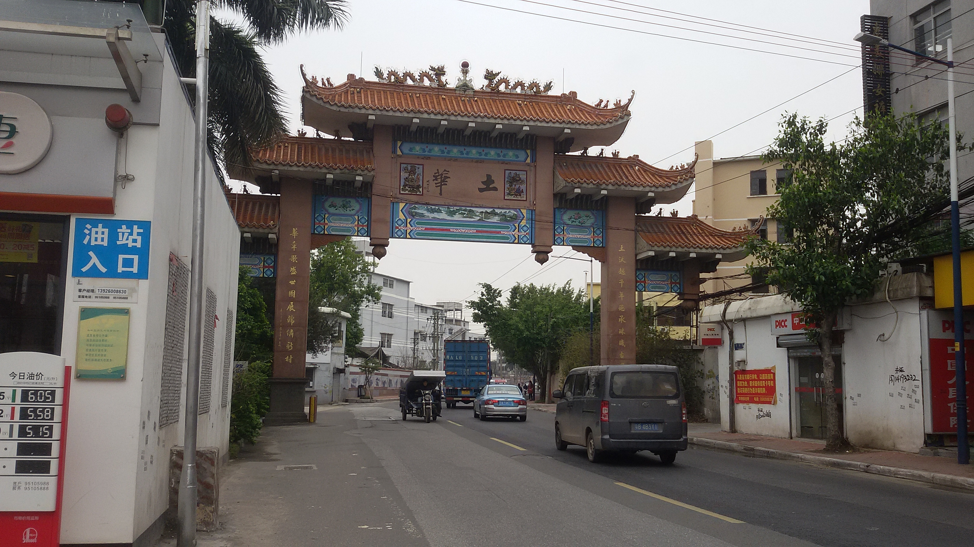 粵語: 土華村北邊牌坊